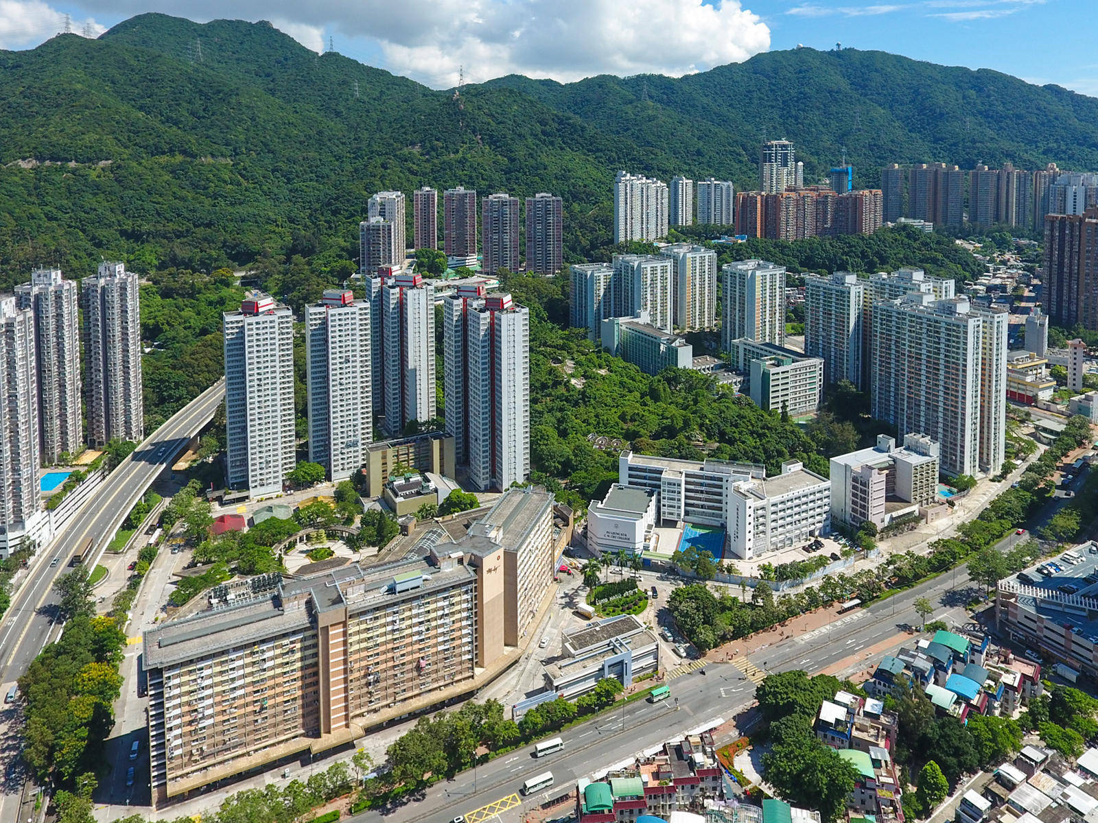 Lung Hang Estate